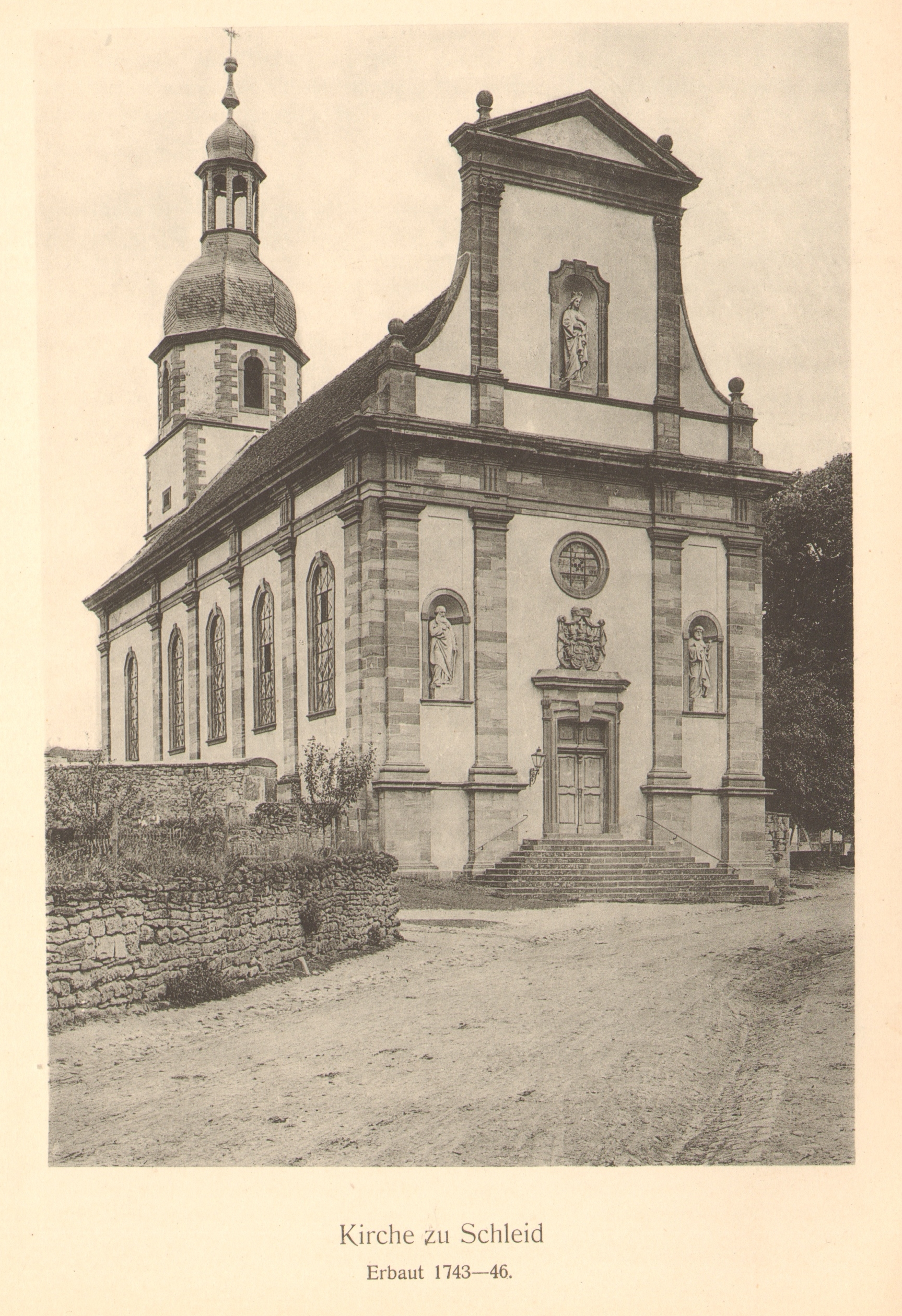 Die kath. Pfarrkirche Kirche von Schleid.